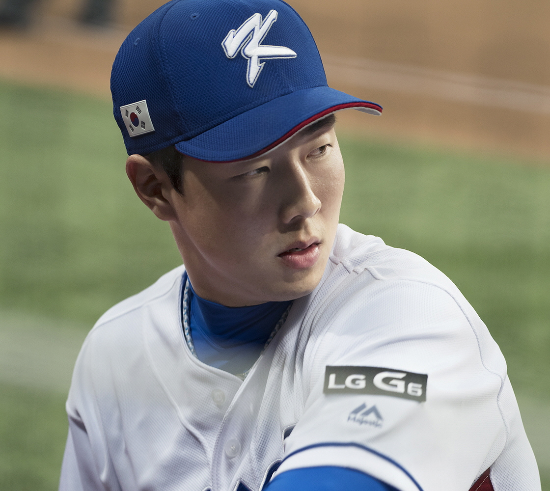 2017 02 28 WBC 평가전 2 박건우